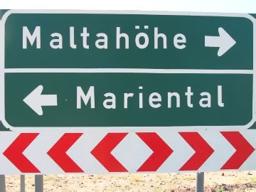 Strassenschild nach Maltahöhe und Mariental in Hardap/Namibia